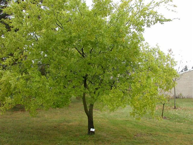 Ulmus parvifolia - Orme de Chine